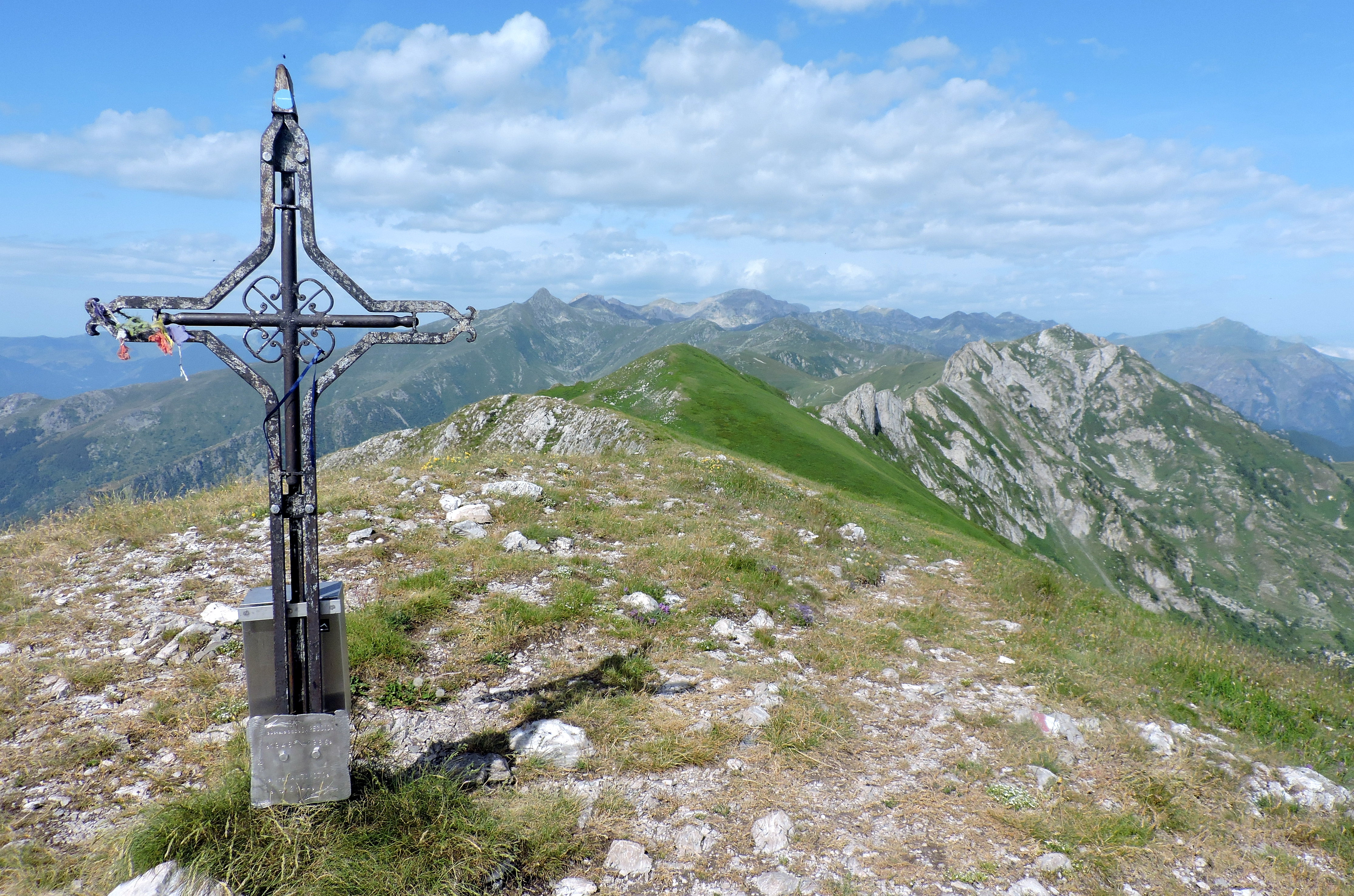 Monte Antoroto (Ligurian Alps): its summit cross